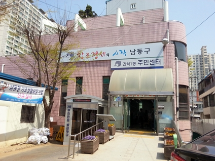 간석1동 주민센터